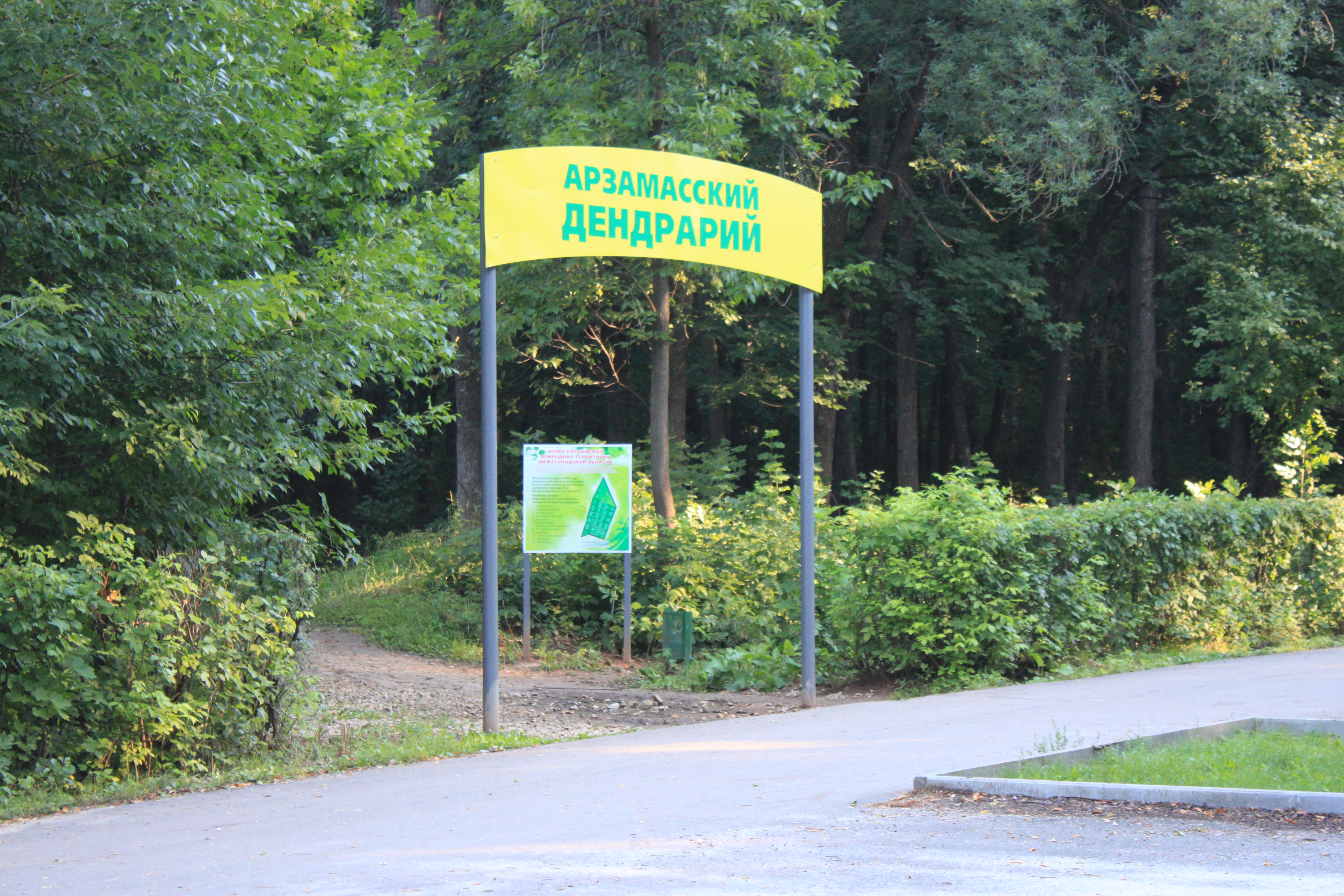 Arborétum